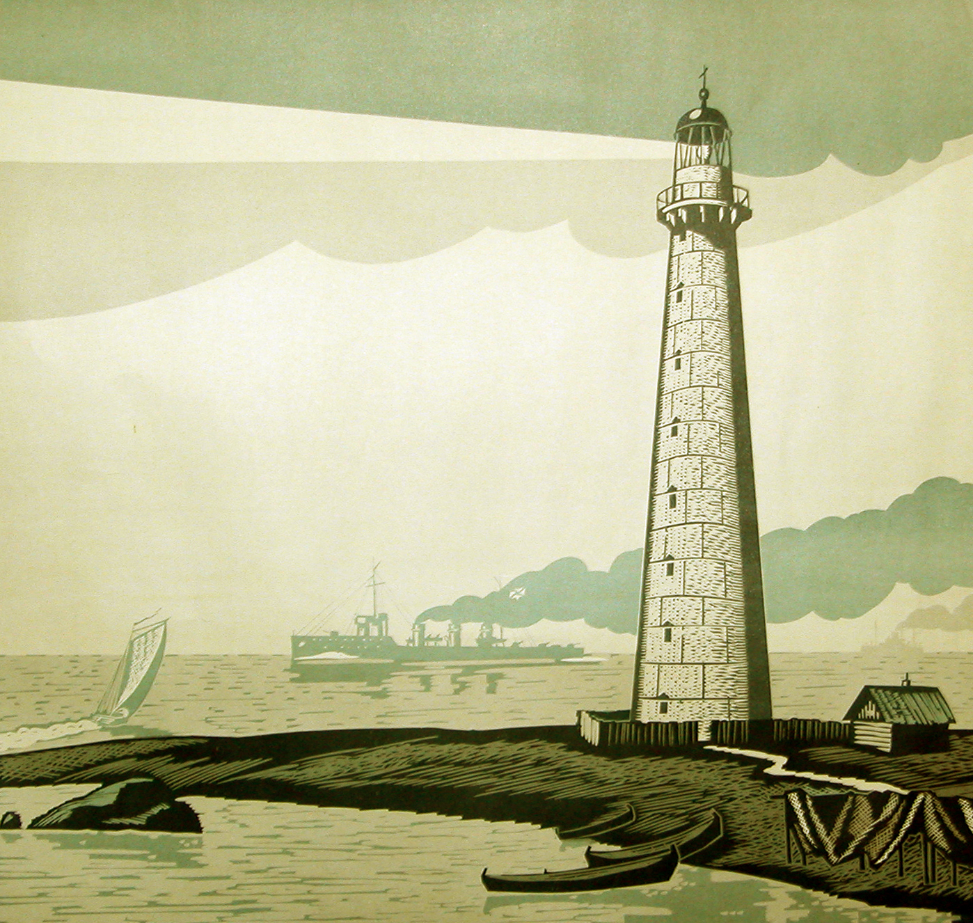 Картина «Маяк Тахкуна. Балтика. Эстония» Вячеслава Ивановича Овчинникова, год (цветная линогравюра)